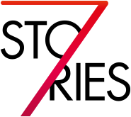 Logo der Produktionsfirma 7Stories GmbH